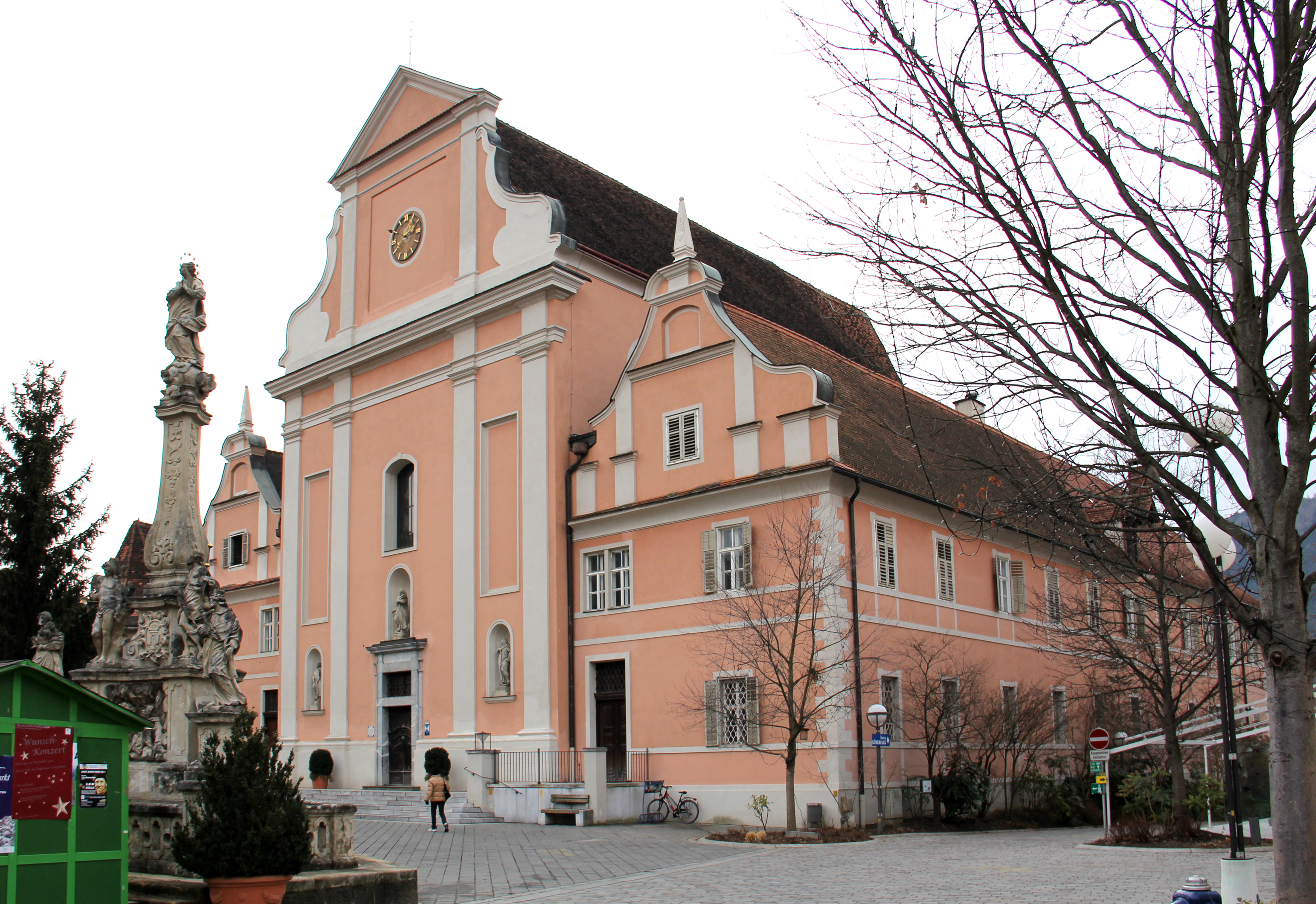 Franziskanerkloster (ehem. Servitenkloster), ehem. Wehrmauer u. Reste v. Vorgänger- bzw. abgekommener Bauten